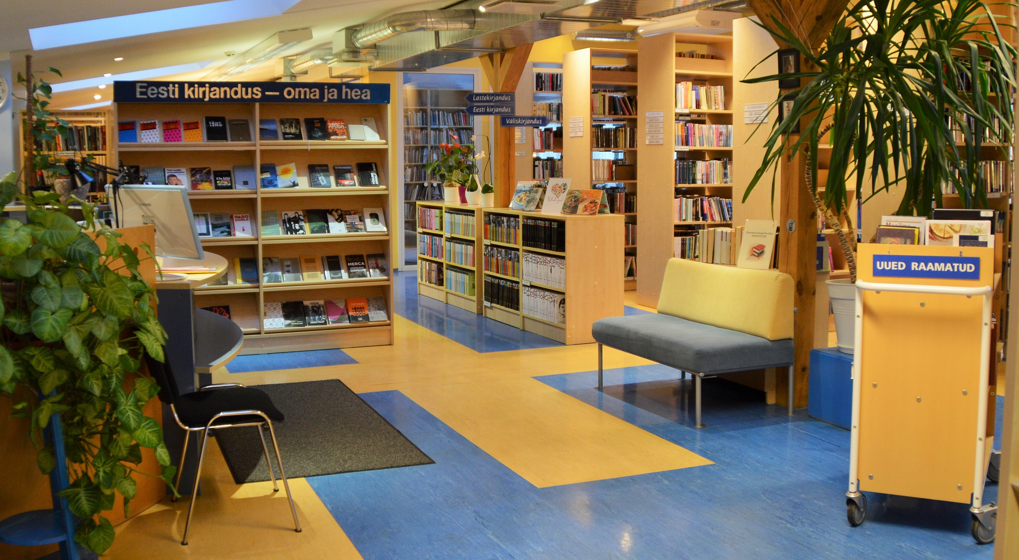 Viimsi Raamatukogu sisevaade